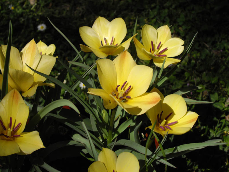 Tulipa batalinii 'Yellow Jewel'